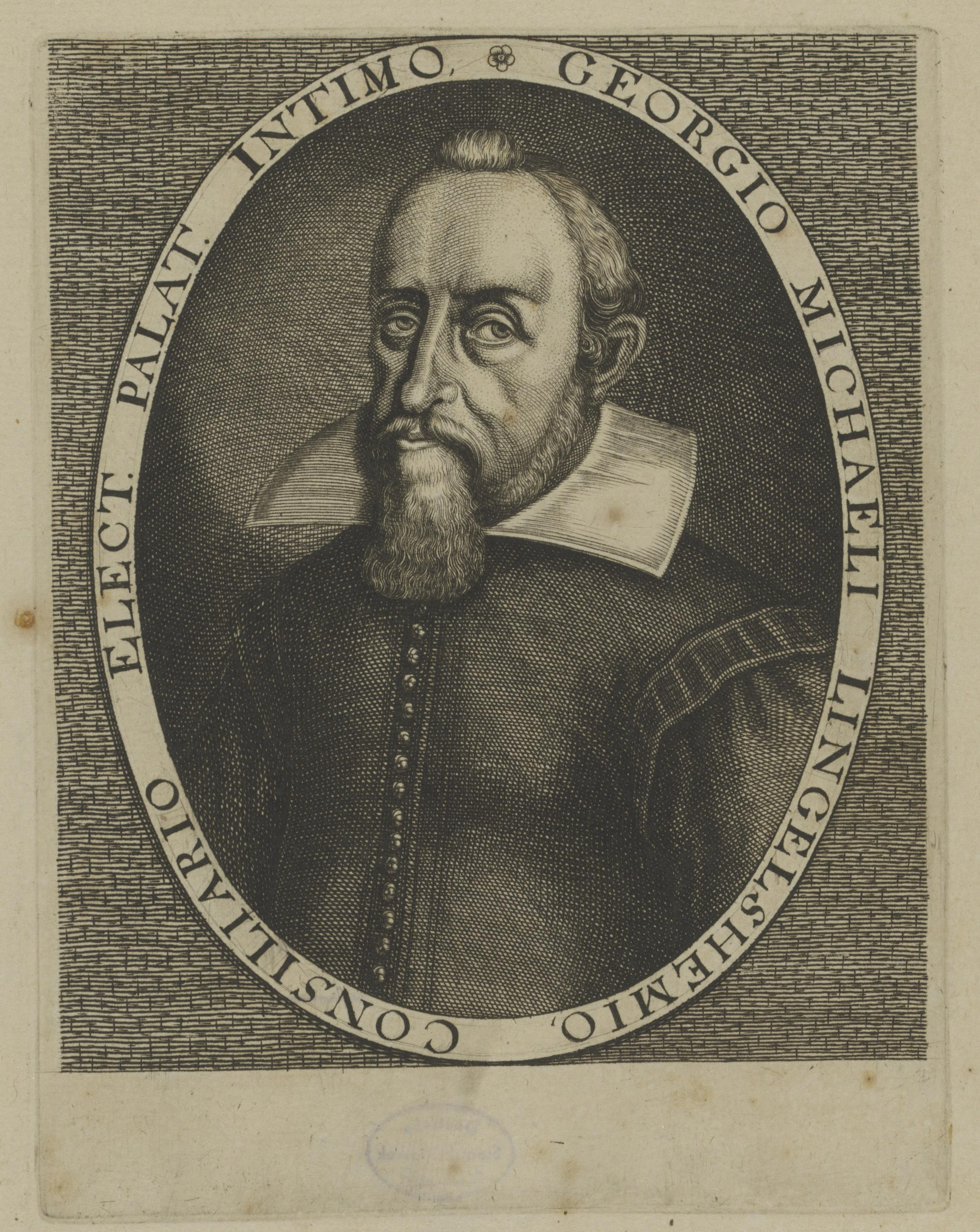 Georg Michael Lingelsheim. Georgius Michael Lingelshemius. Kupferstich, 17.0 x 13.0 cm; Berlin, Staatsbibliothek zu Berlin - Preußischer Kulturbesitz, Handschriftenabteilung, Inventar-Nr. Portr. Slg / Slg Hansen / Staats- und Standespersonen / Bd. 5 / Nr. 58